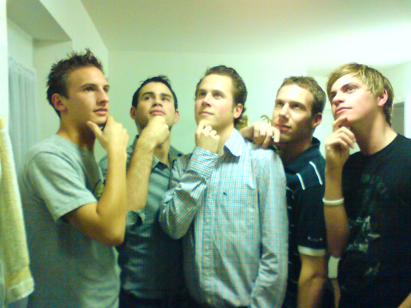 ein typisches Beispiel